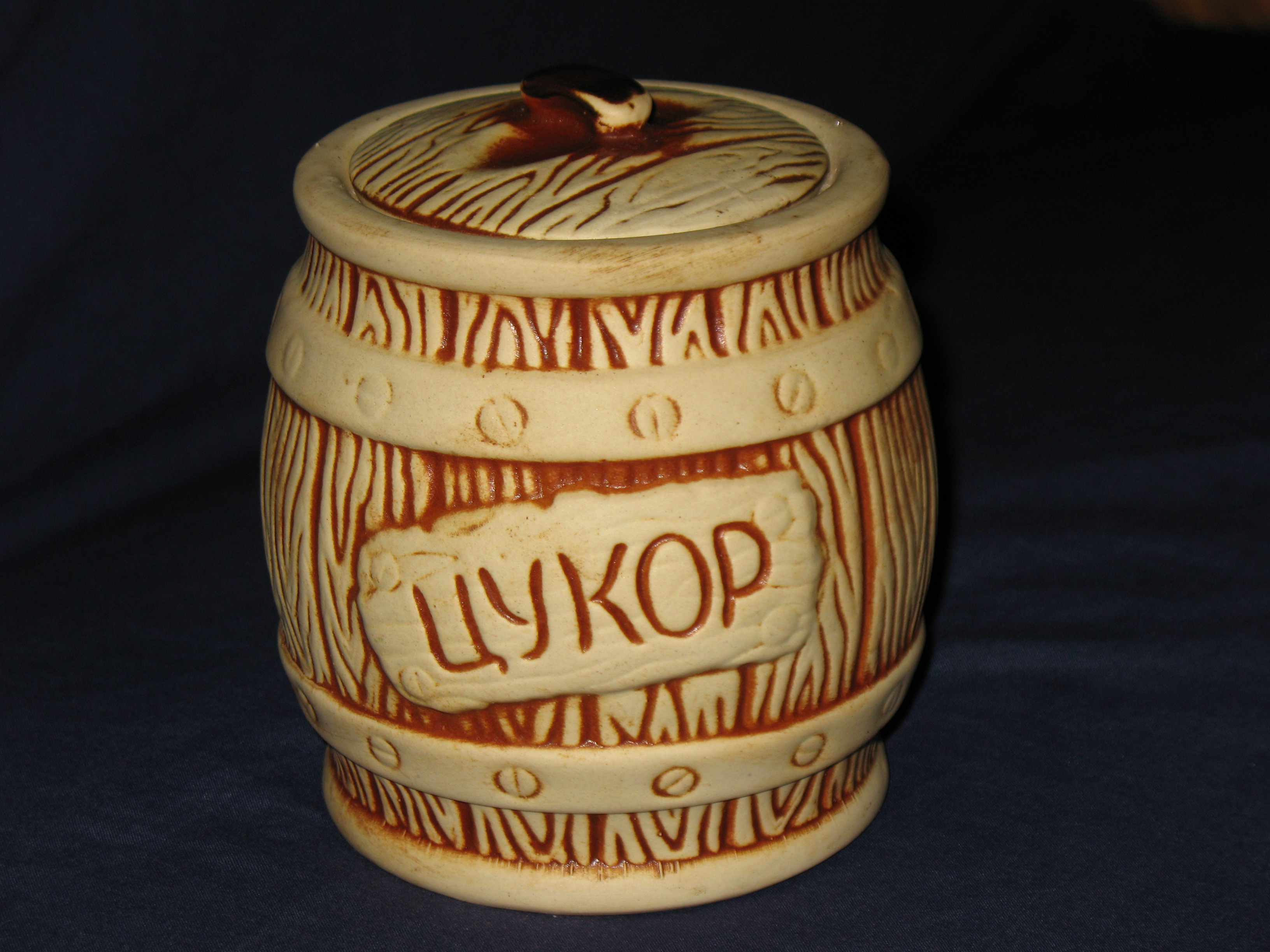 Sugar tank (Ukrainian SSR). русский: Керамический горшок для сахара с надписью "ЦУКОР". Украинская ССР, Славянский фаянсовый завод.